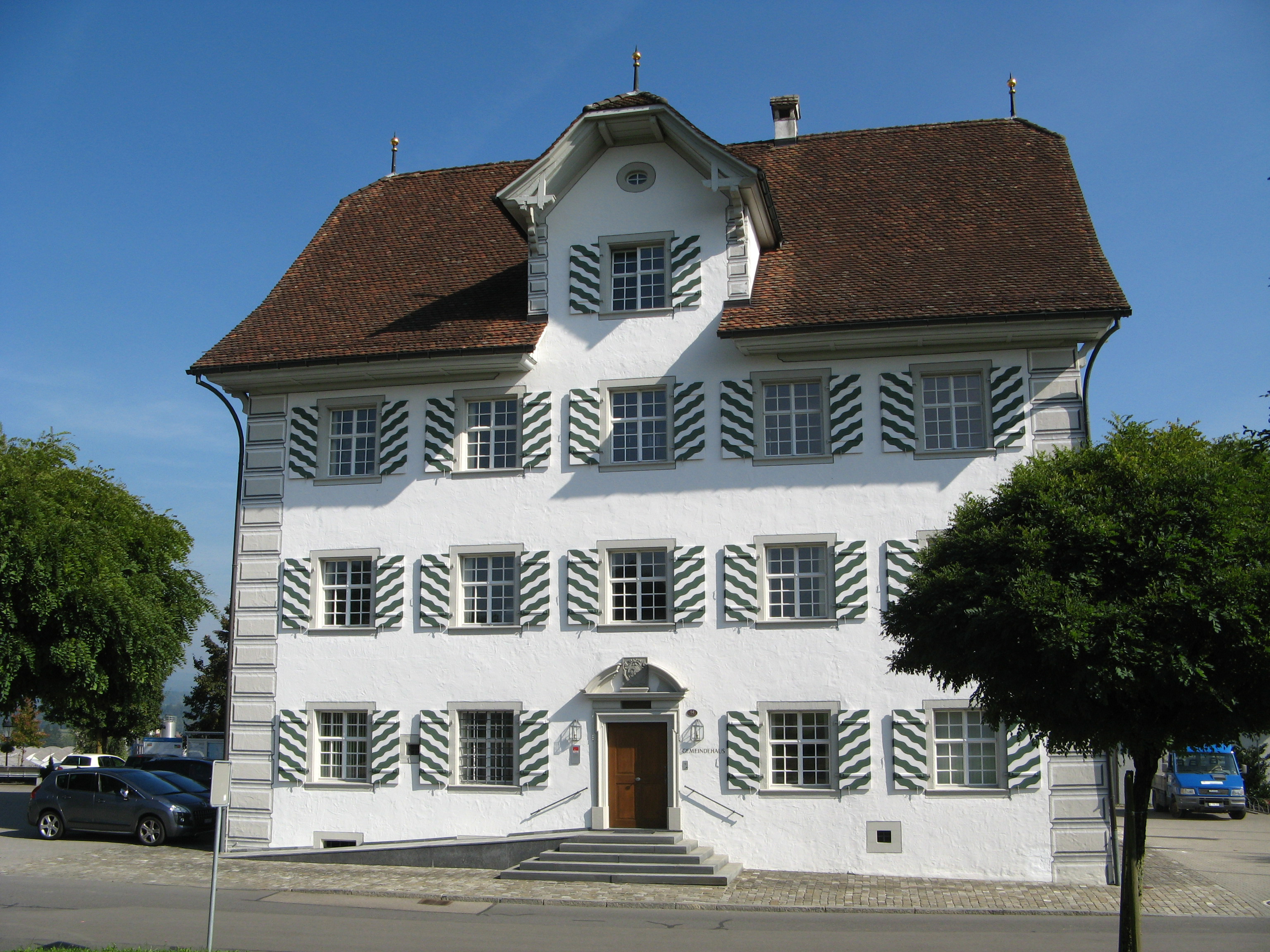 Gemeindehaus von Sins, 24. September 2013